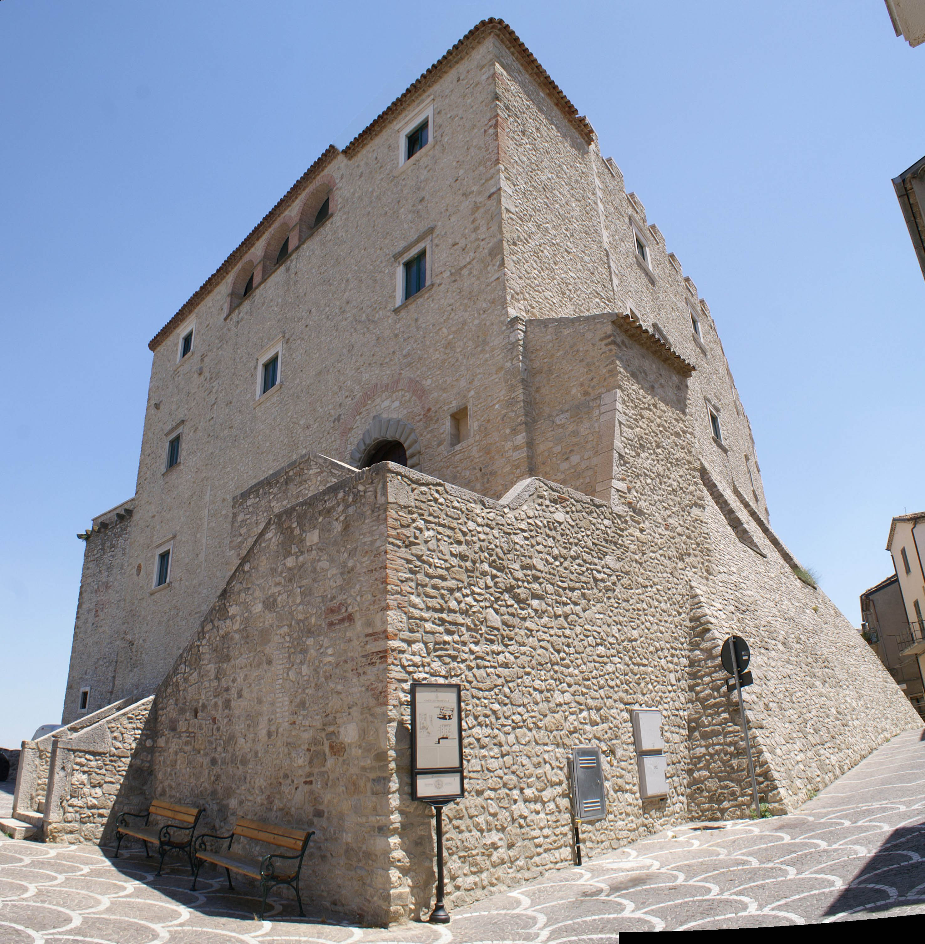 Castello di Capua - MIBAC This is a photo of a monument which is part of cultural heritage of Italy.